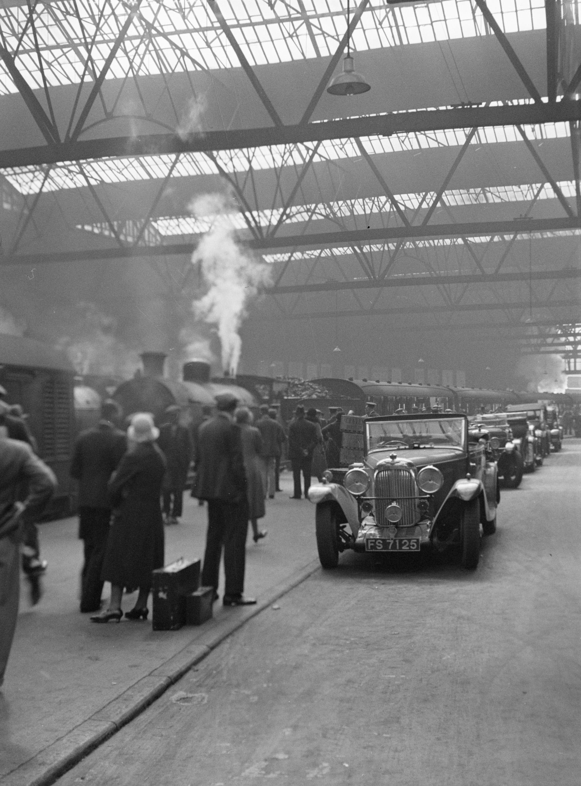 Collectie / Archief : Fotocollectie Van de Poll Reportage / Serie : Schotland - Stadsgezicht Edinburgh Beschrijving : Reizigers op Caledonian Station Annotatie : Caledonian Station in Princess Street werd gebouwd in 1899 en gesloten in 1965. Datum : 1934 Locatie : Edinburgh, Groot-Brittannië, Schotland Trefwoorden : auto's, stations Fotograaf : Poll, Willem van de Auteursrechthebbende : Nationaal Archief Materiaalsoort : Glasnegatief Nummer archiefinventaris : bekijk toegang 2.24.14.02 Bestanddeelnummer : 190-1062